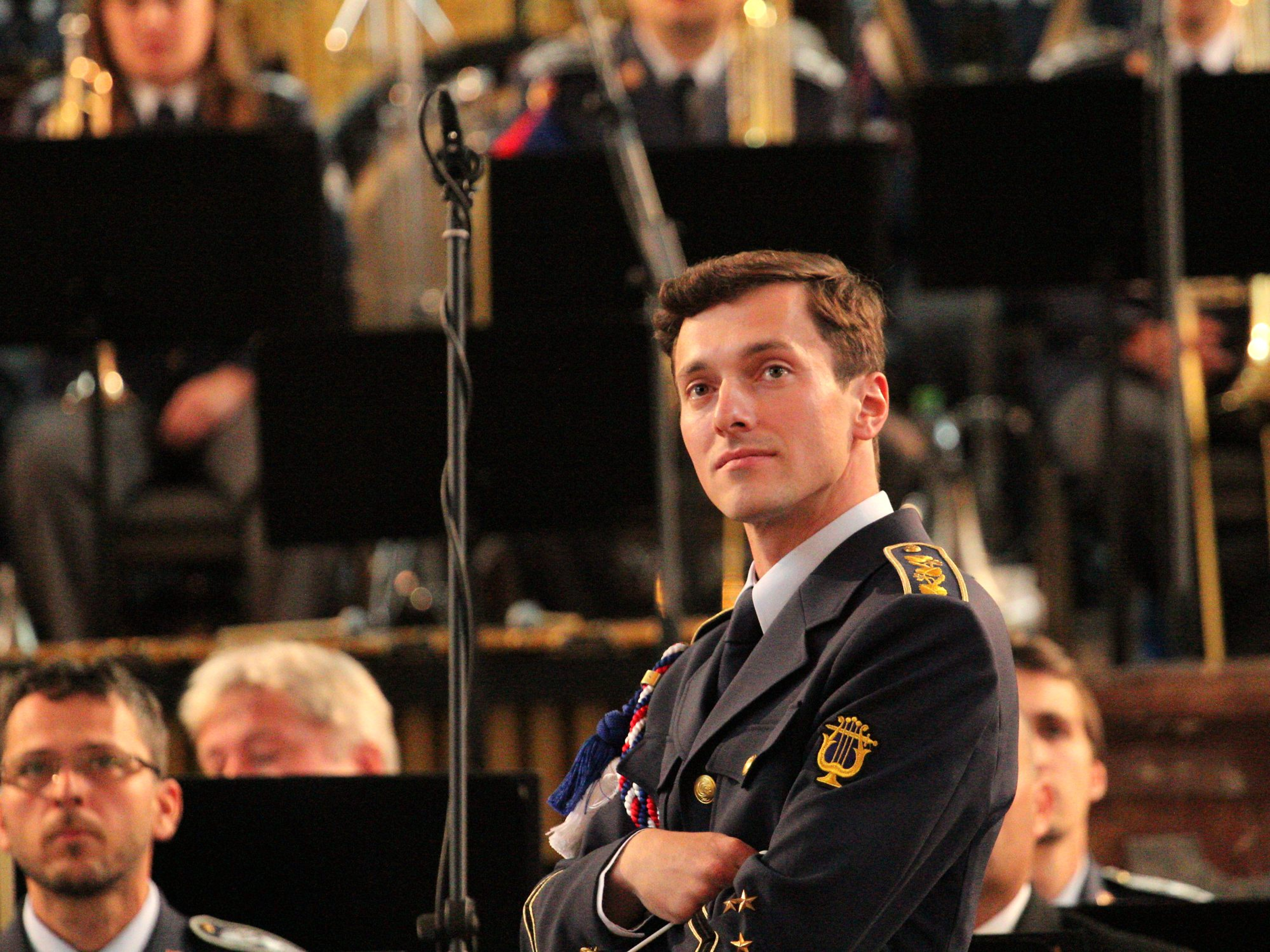 Jan Zástěra